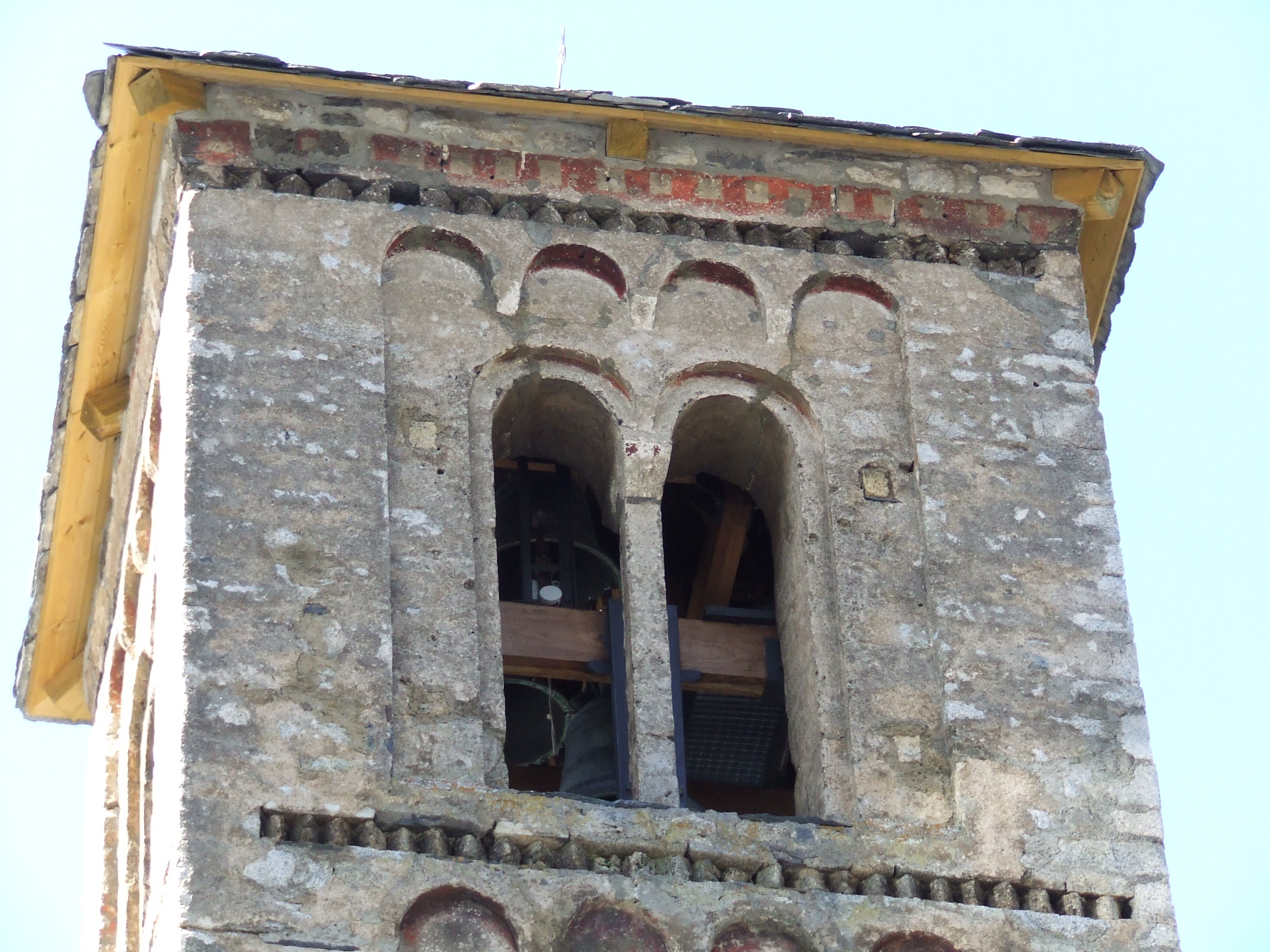 Restes de pintures a les arcades del pis superior del campanar (Santa Maria de Taüll, Vall de Boí, Alta Ribagorça)